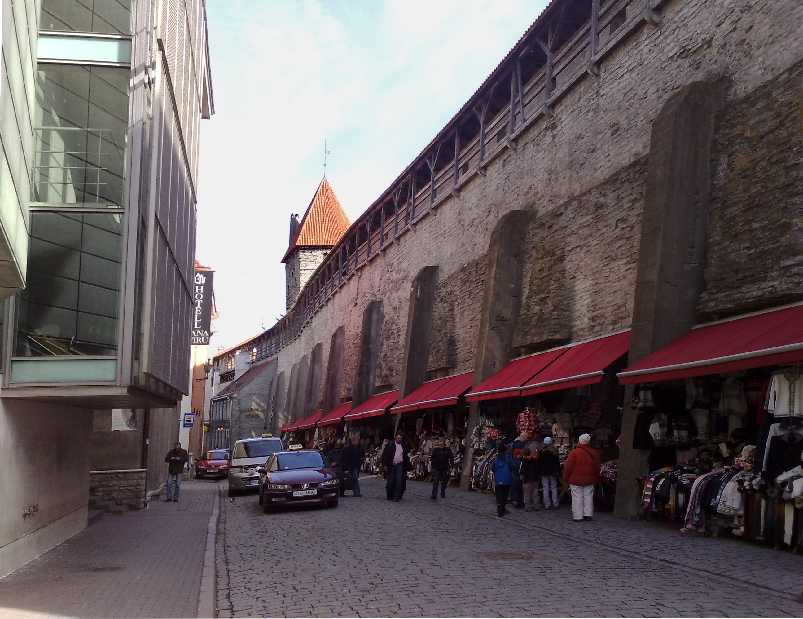 Müürivahe street in Tallinn.